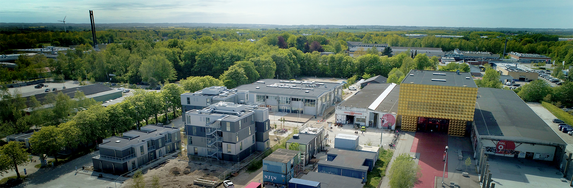 Højskolebygningen er skabt i omkring en eksisterende betonfabrikshal. Boligerne er bygget af rumstore moduler beklædt med stålprofilpladser. Til højre for højskolen ligger naboerne Makers Corner og rockmuseet Ragnarock med den store guldfacade.